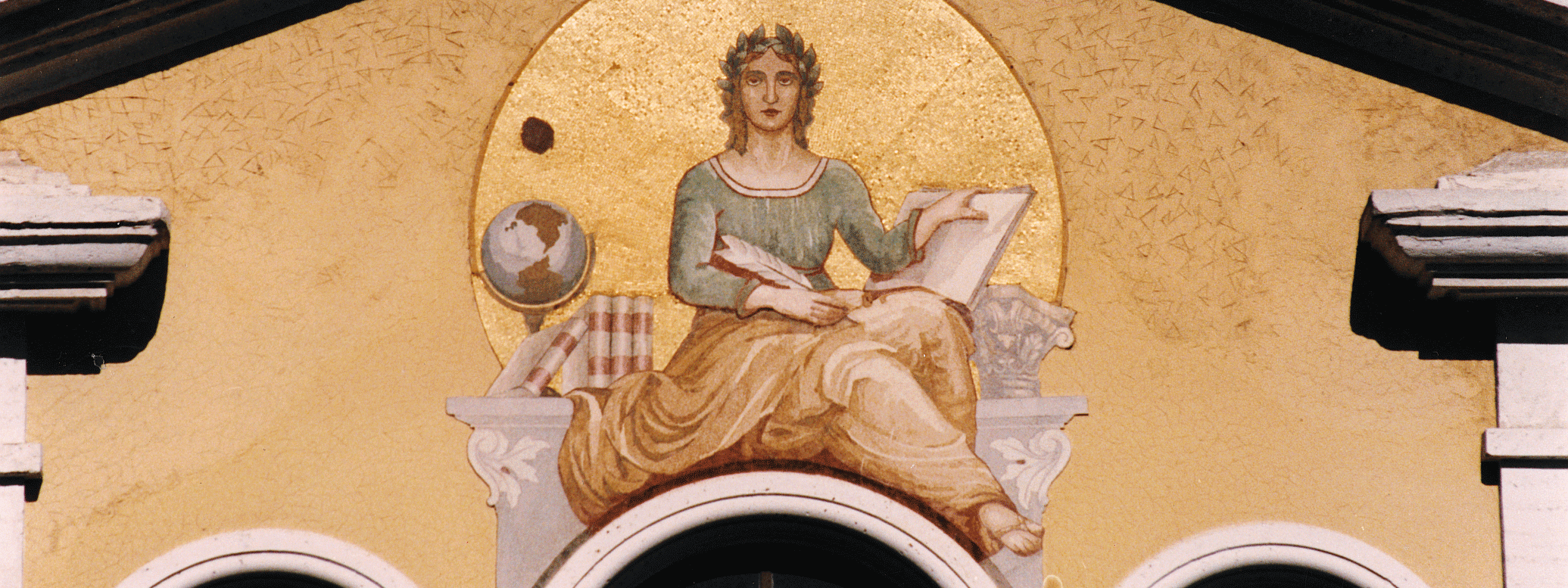 Simbolo dell'Accademia Cosentina nell'edificio nel centro storico di Cosenza